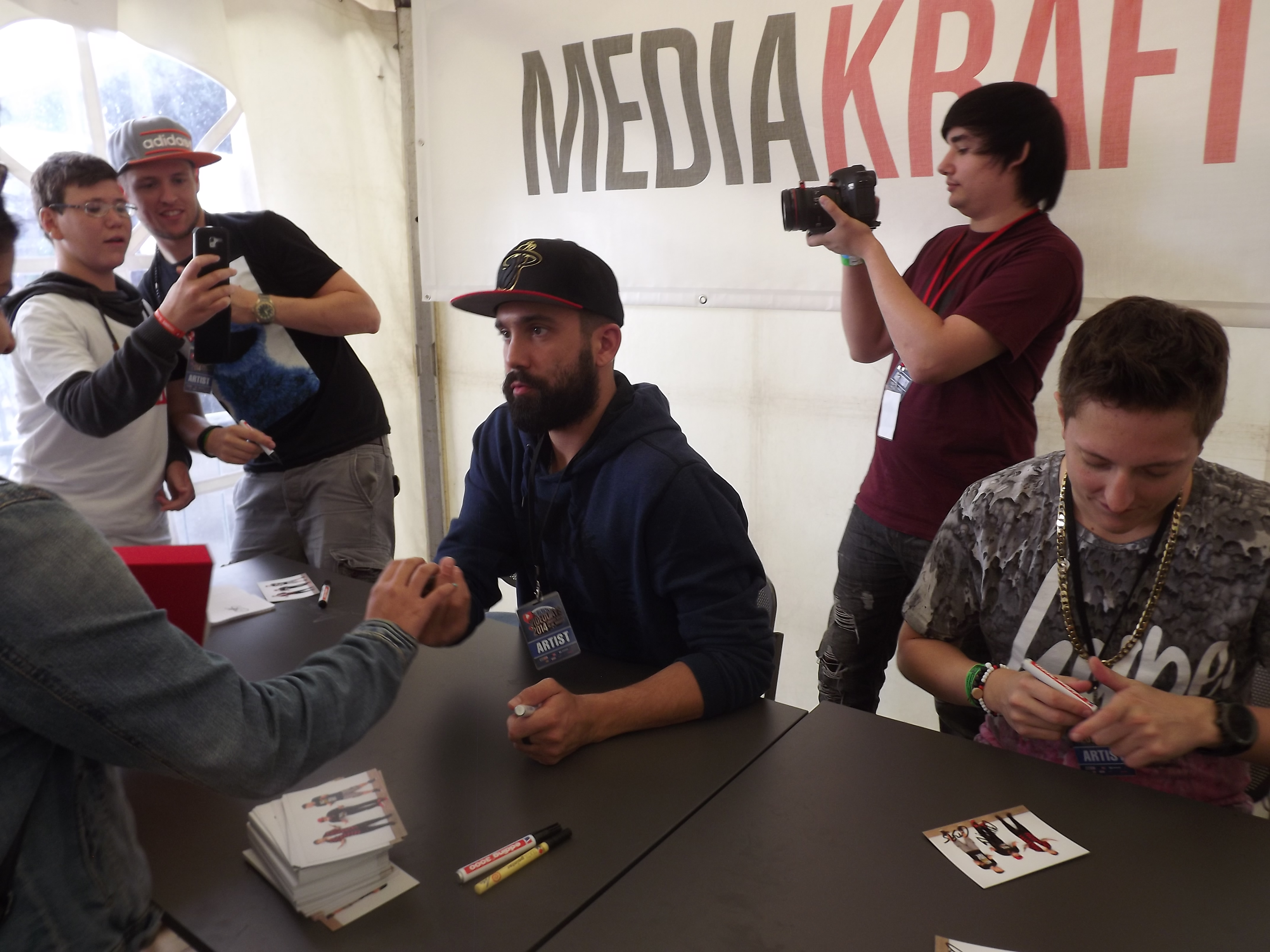 Meet & Greet mit BULLSHIT TV auf den Videodays 2014